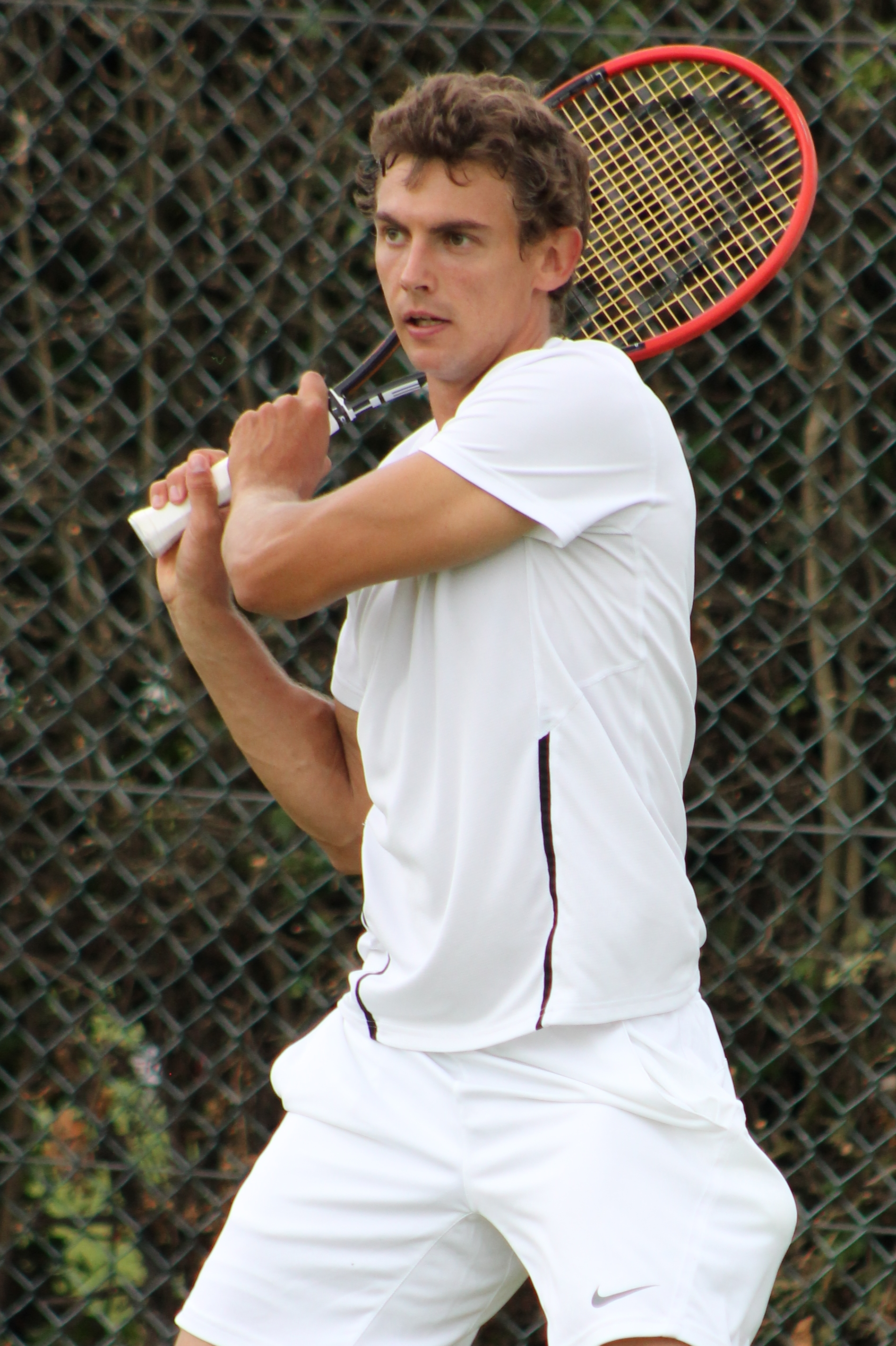 Laaksonen WMQ14 (4)